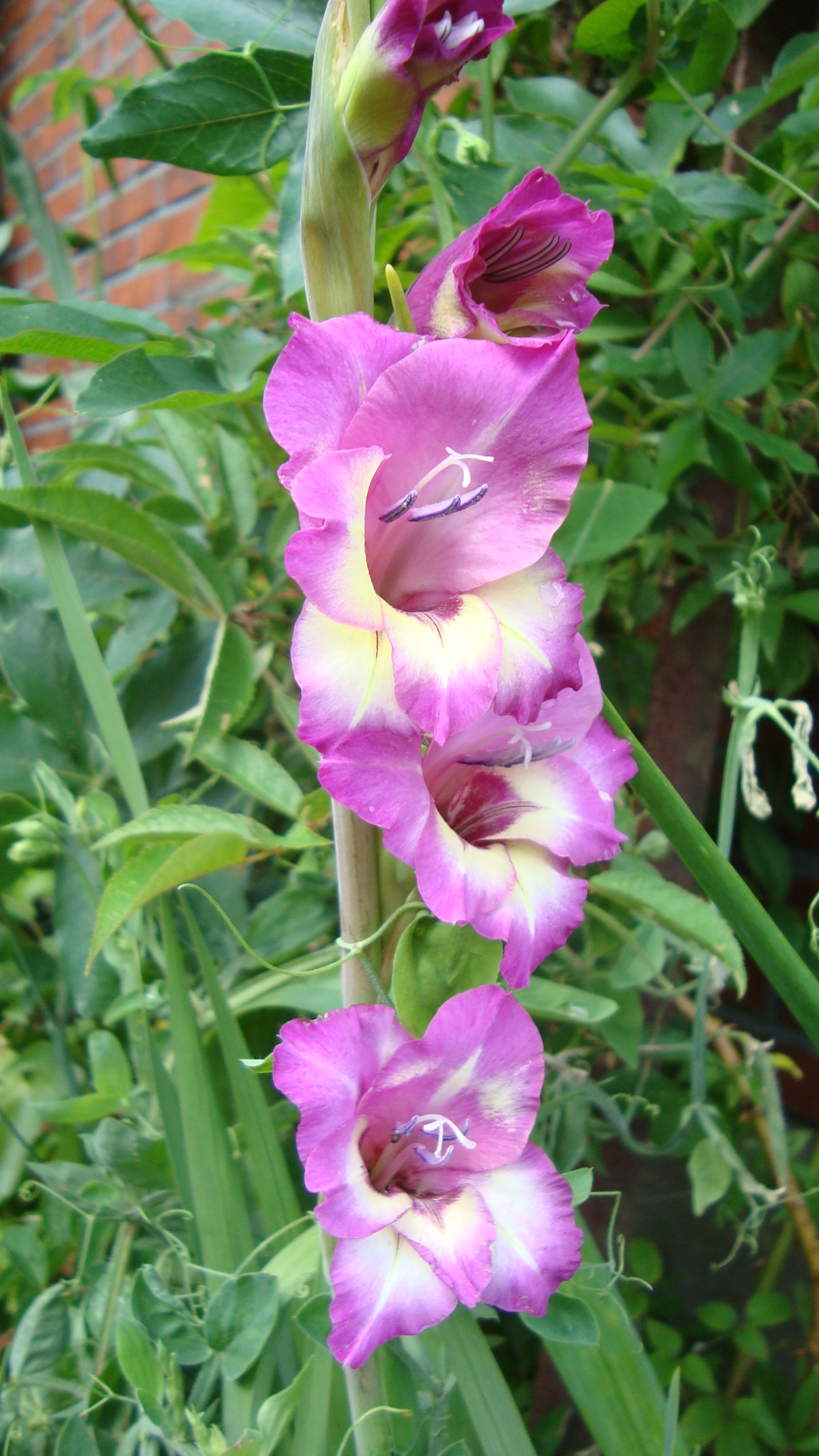 Galdiolus 'Flevo Amico' (Snoek)